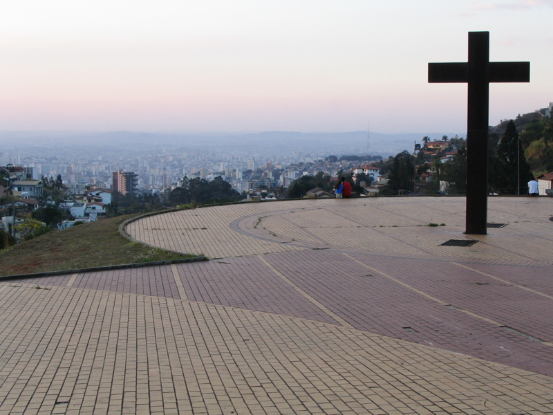 Sunset from the Pope's Plaza (Praça do Papa), Belo Horizonte; Brazil.